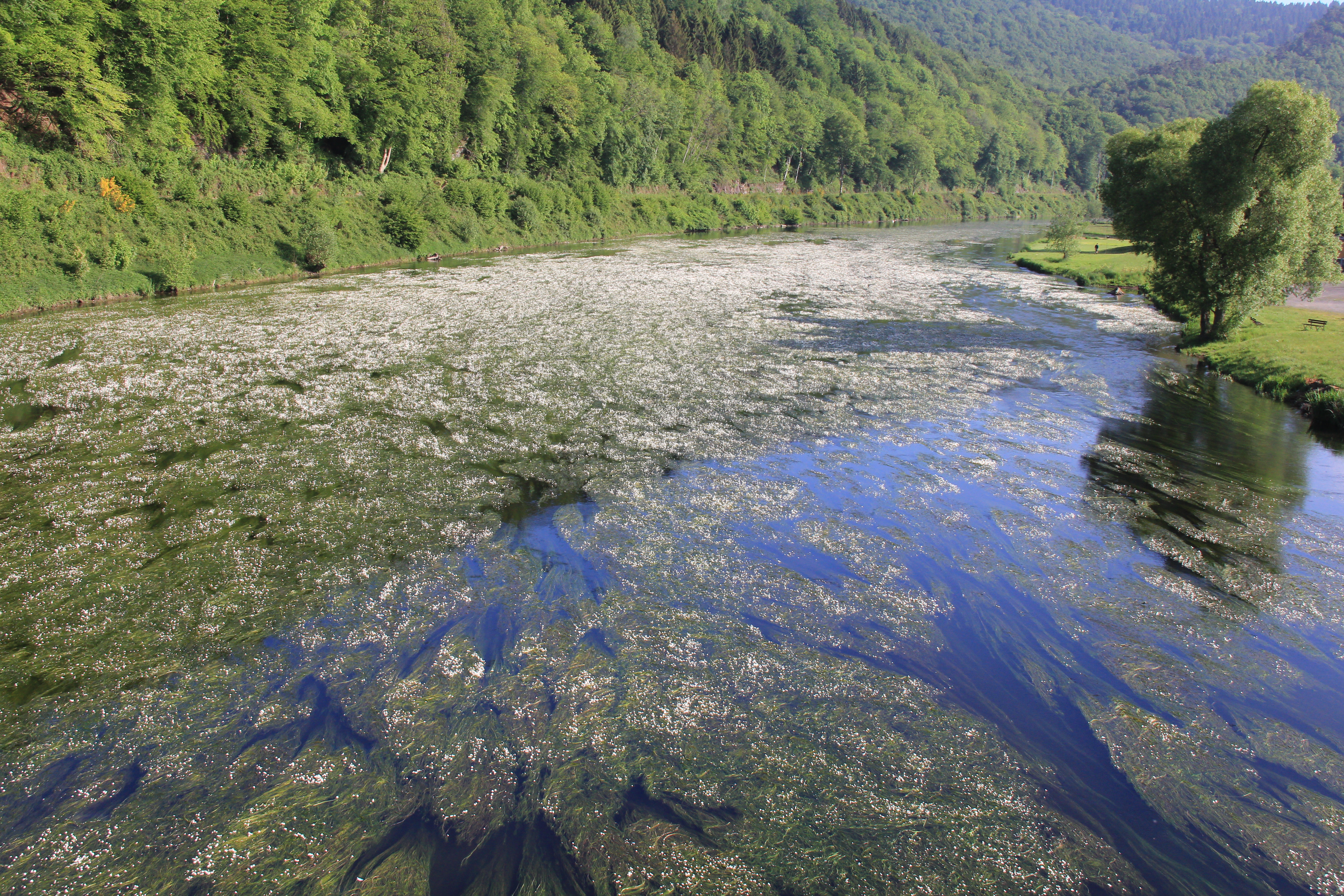 Rivière Semoy fleurie - Naux, Commune de Thilay